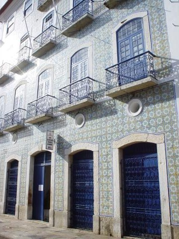 Description in de wikipedia Beschreibung: Azulejofassade in der Altstadt von São Luiz Quelle: Fotographiert 2003 Fotograf oder Zeichner: Frank Krämer Lizenzstatus: Public Domain